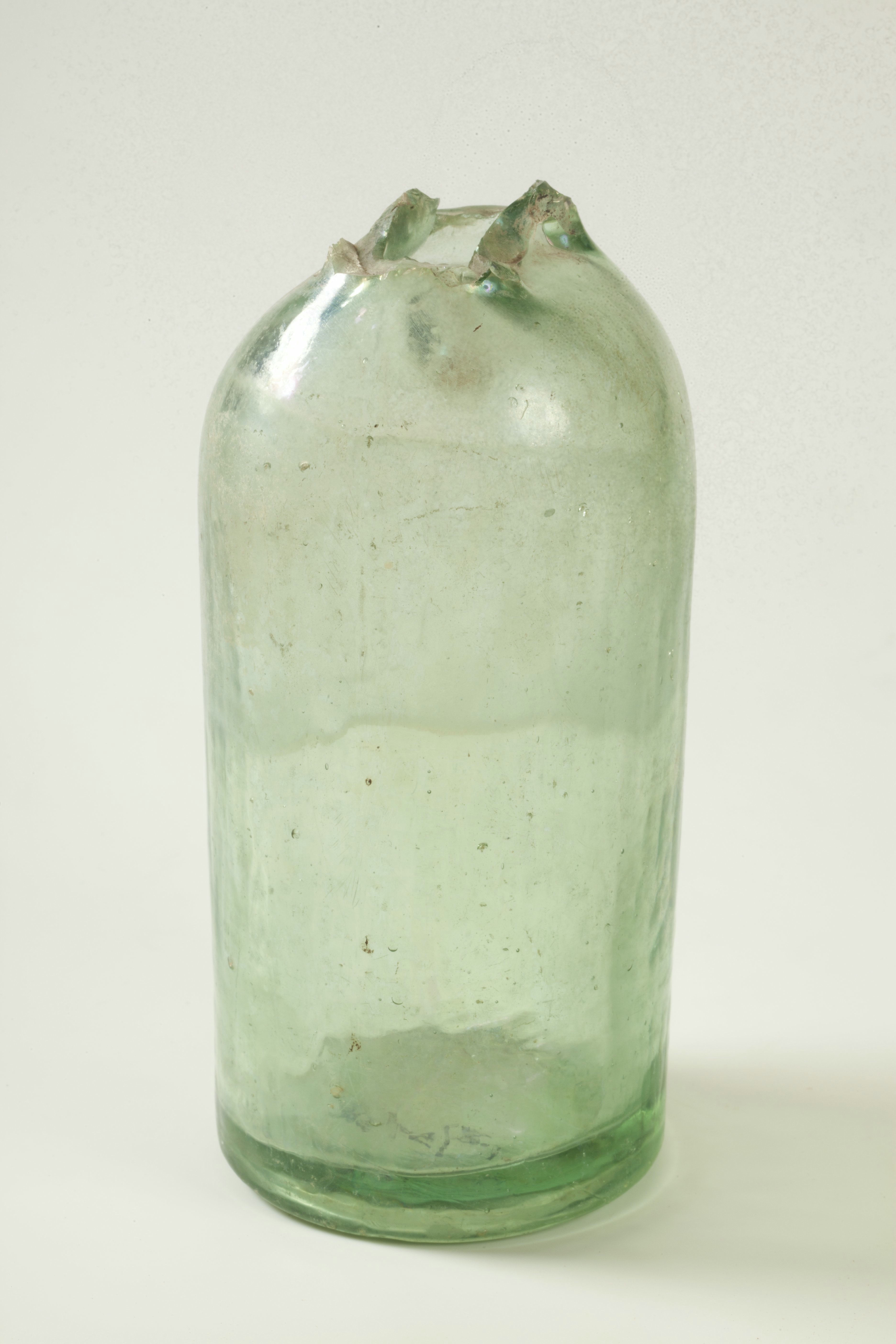 kogelflesje zonder hals Objectnummer: [MA]ZO1965-X1Materiaal: Glas